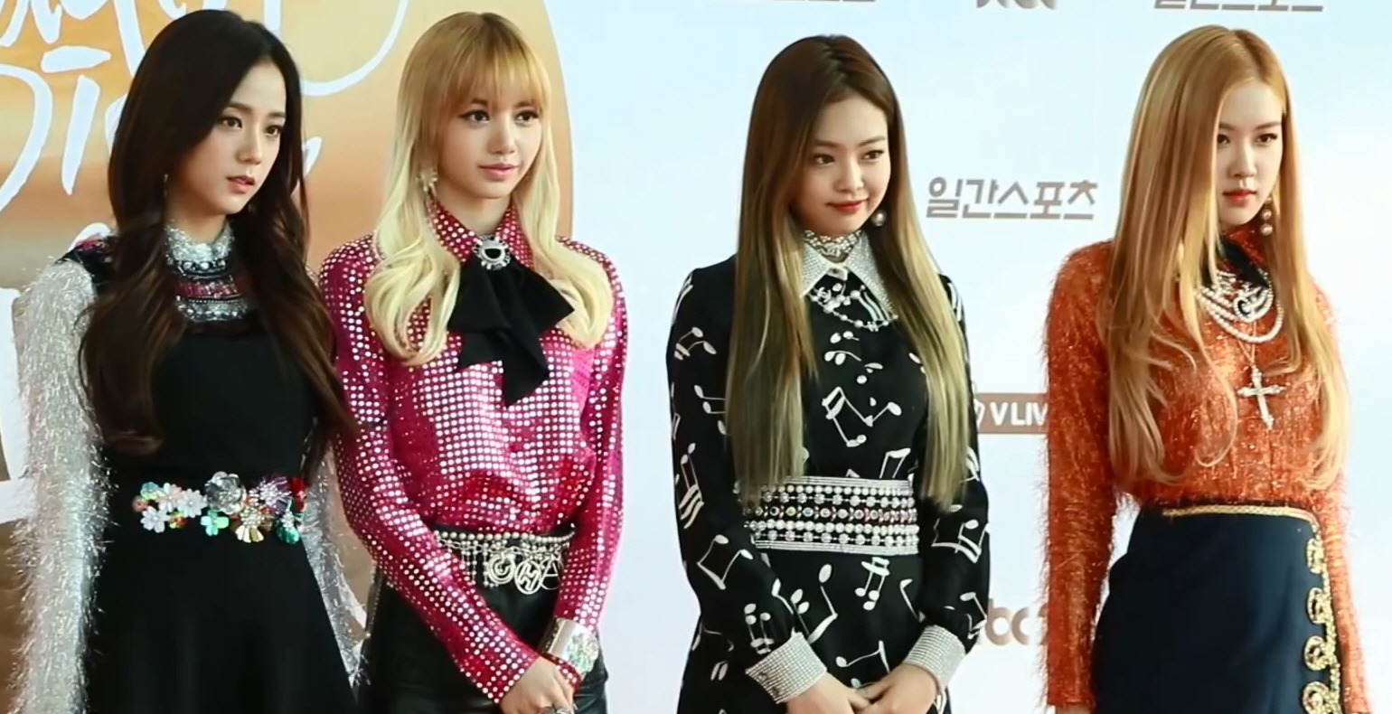 (TV10) 여자친구·트와이스·블랙핑크, 레드카펫 각양각색 패션 열전 (2017 골든디스크 레드카펫)